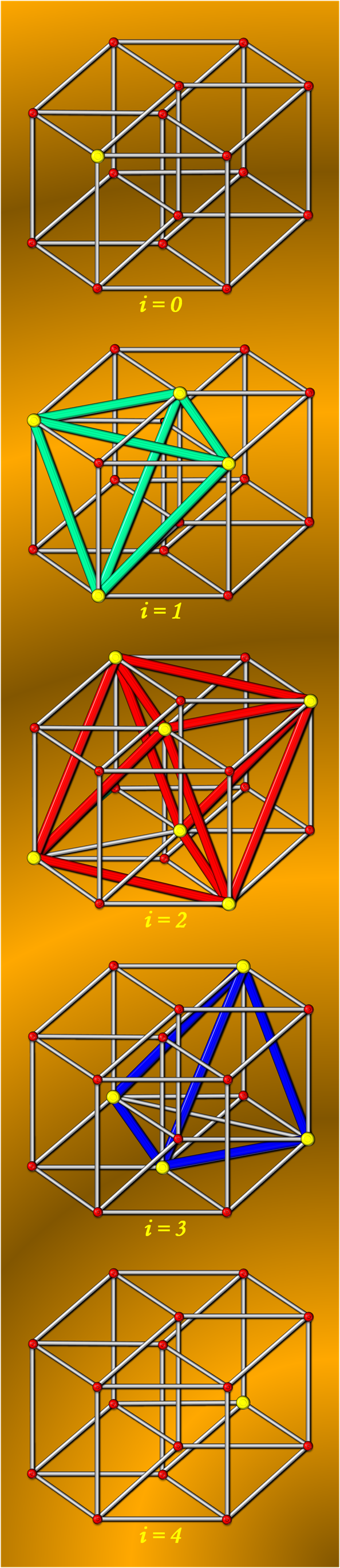 Le cinque sezioni ortoassiali del Tesseratto relative ad un suo vertice. Sono ottenute sezionando l'ipercubo 4D con cinque spazi 3D ortogonali alla diagonale condotta per il vertice dato e passanti per i vertici del Tesseratto.